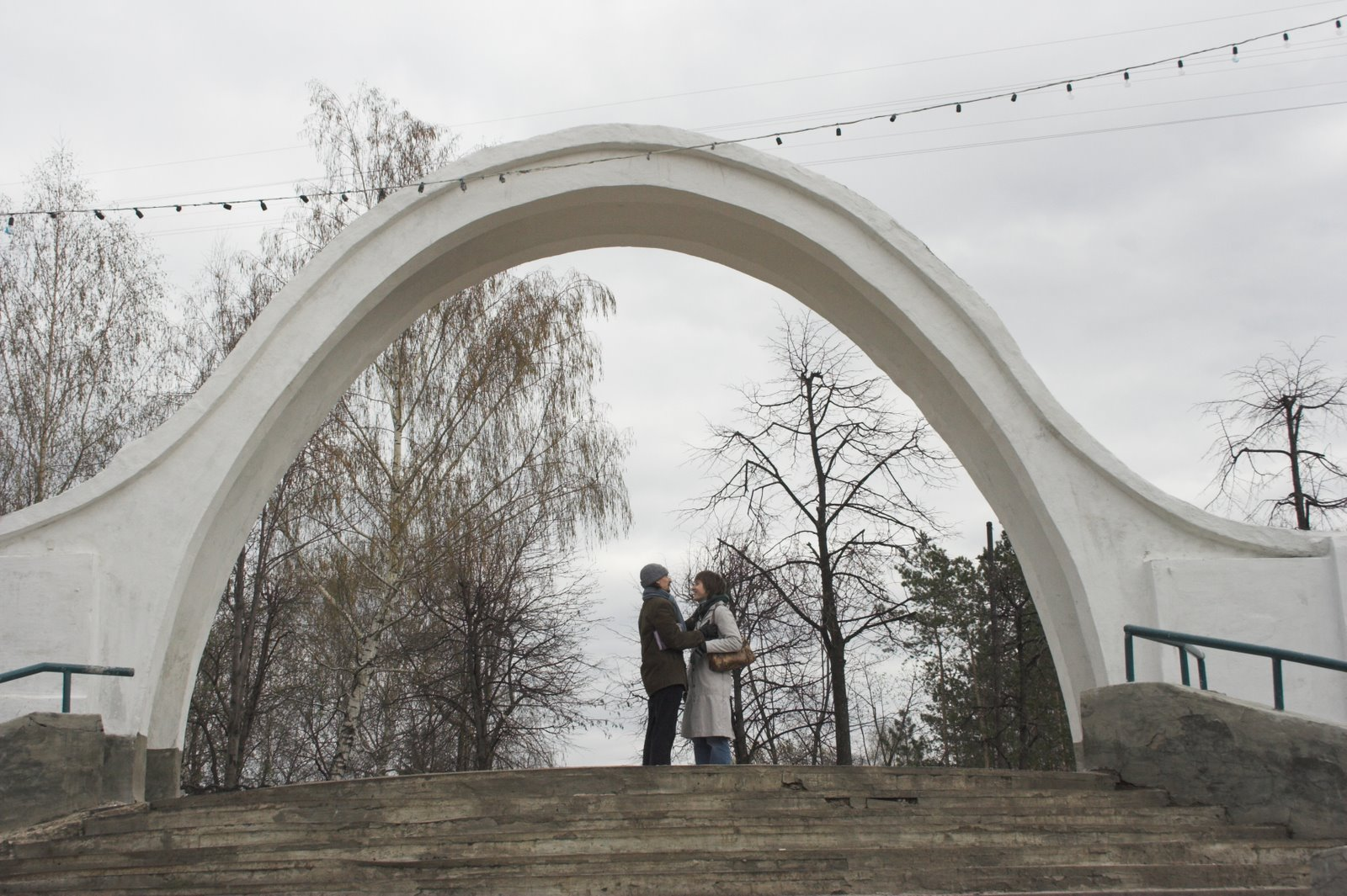 Арка влюблённых, г. Казань